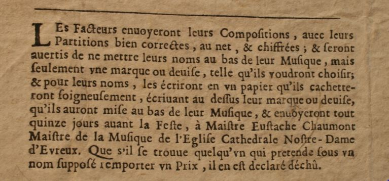 Un extrait de l'affiche du Puy d'Evreux de 1667